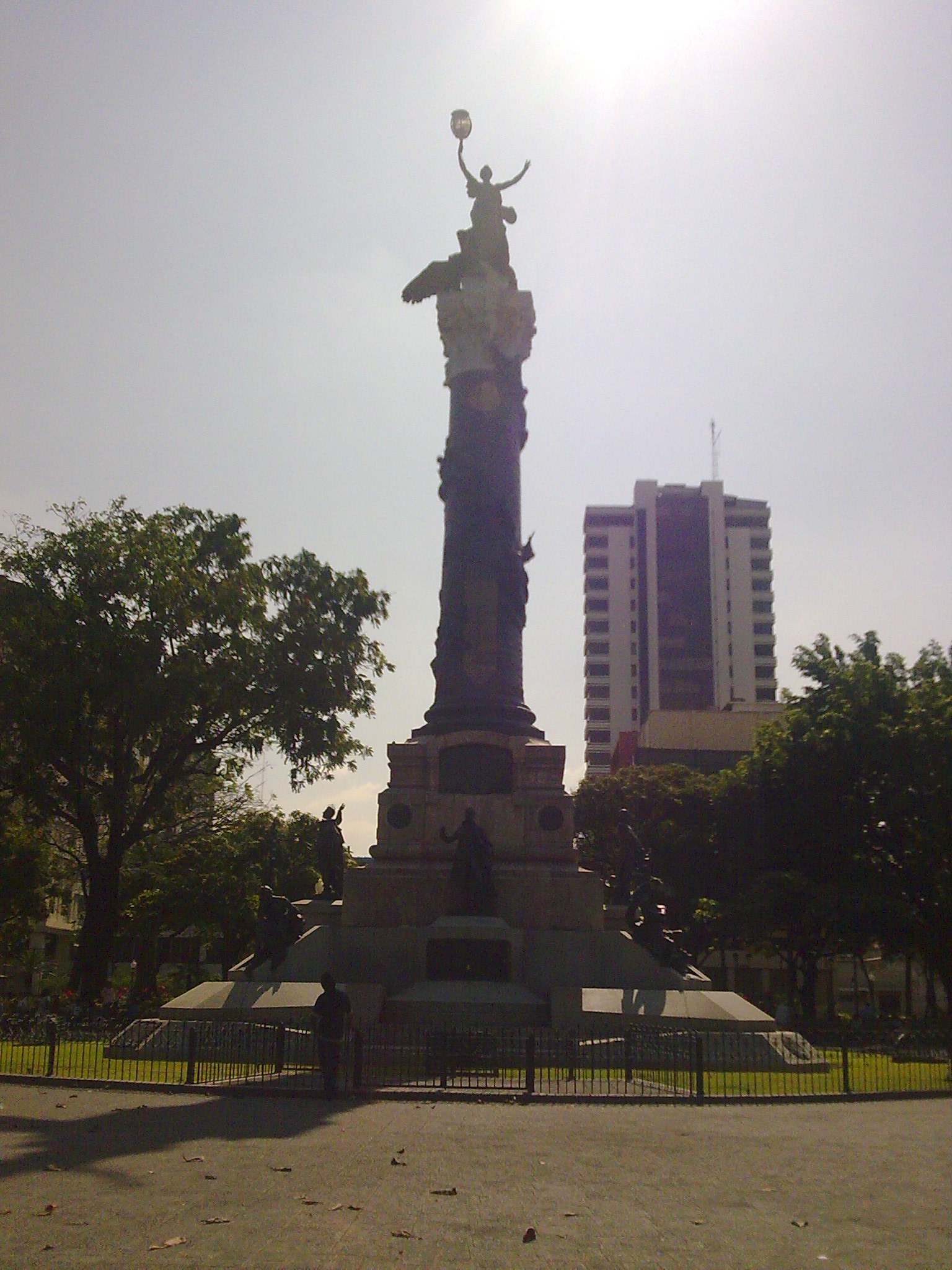 Monumento a los próceres del 9 de octubre de 1820 al atardecer.